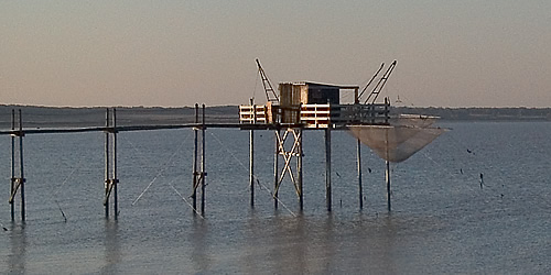 Un carrelet de Charente-Maritime Photo issue de ma banque d'images personnelle